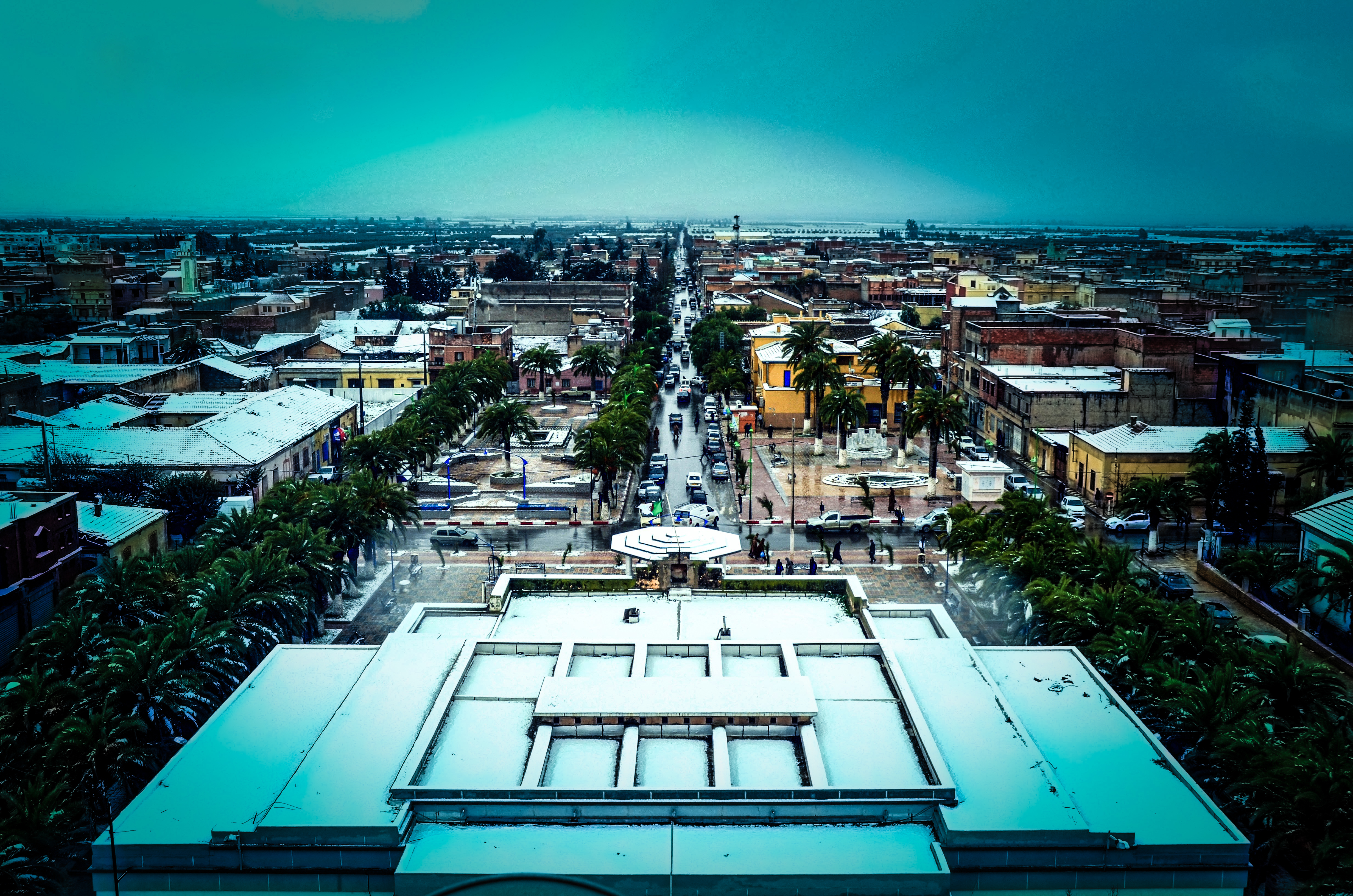 دائرة تيغنيف من علي صومعة المسجد الكبير